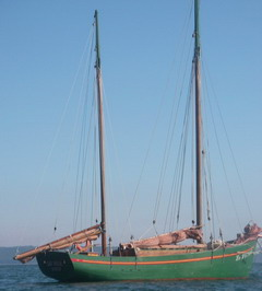 photo prise au tinduff